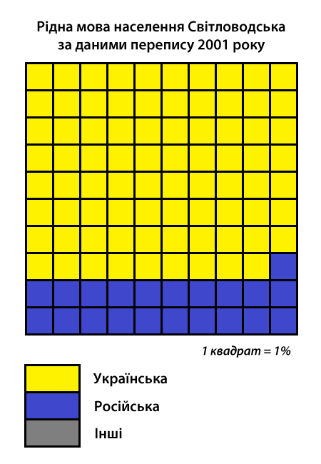 Інфографіка розподілу населення міста Світловодськ за рідною мовою згідно з даними перепису 2001 року. Джерело: Розподіл населення Кіровоградської області за рідною мовою (у % до загальної чисельності населення) за переписом 2001 року